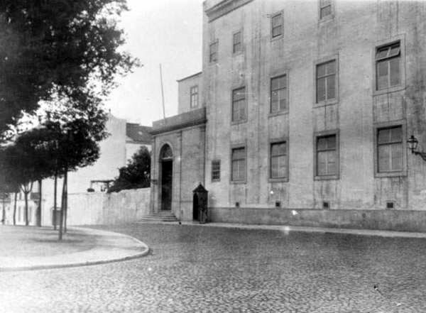 Funiculares de Lisboa.